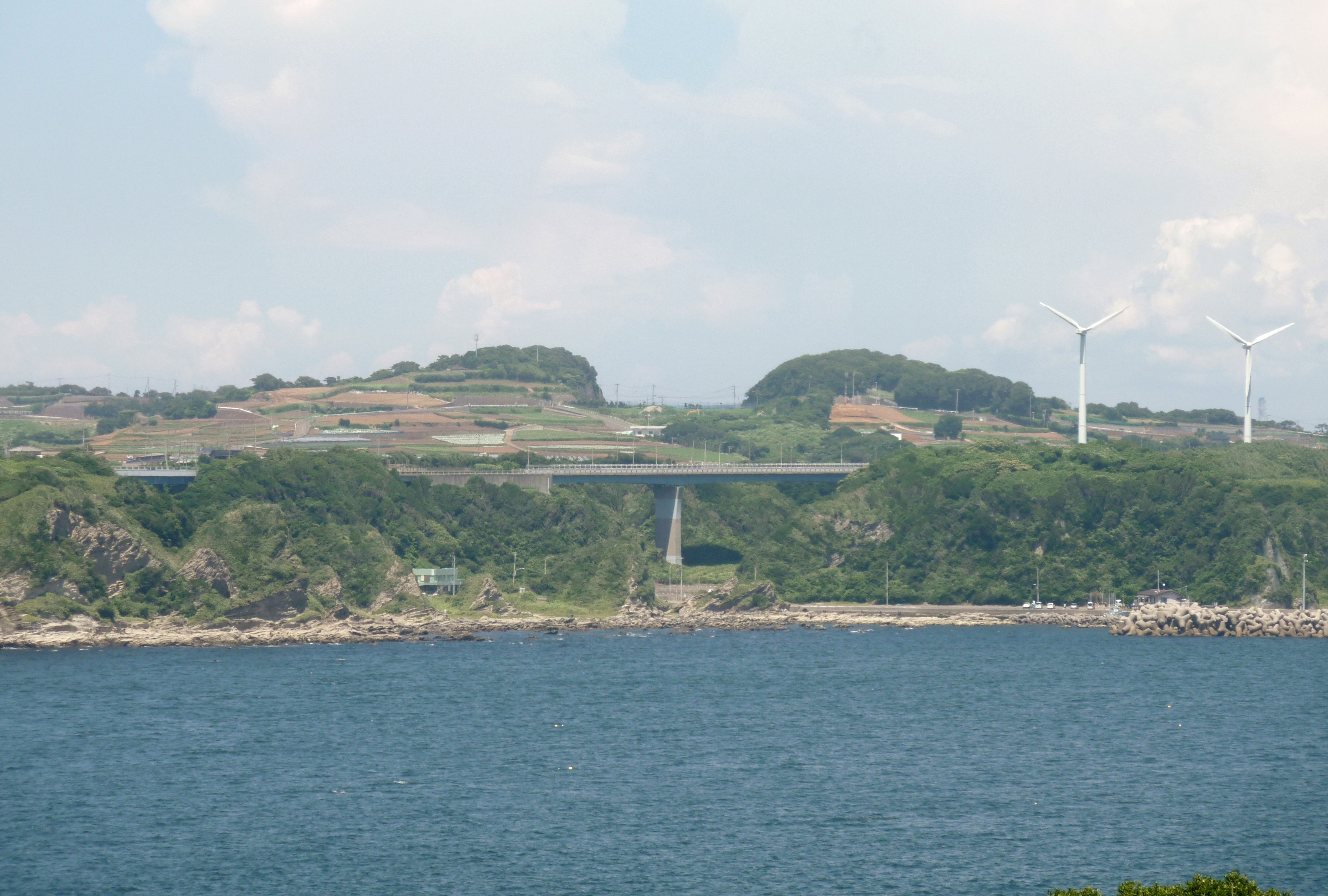 城ヶ島公園の第一展望台から望む岩堂山（神奈川県三浦市）